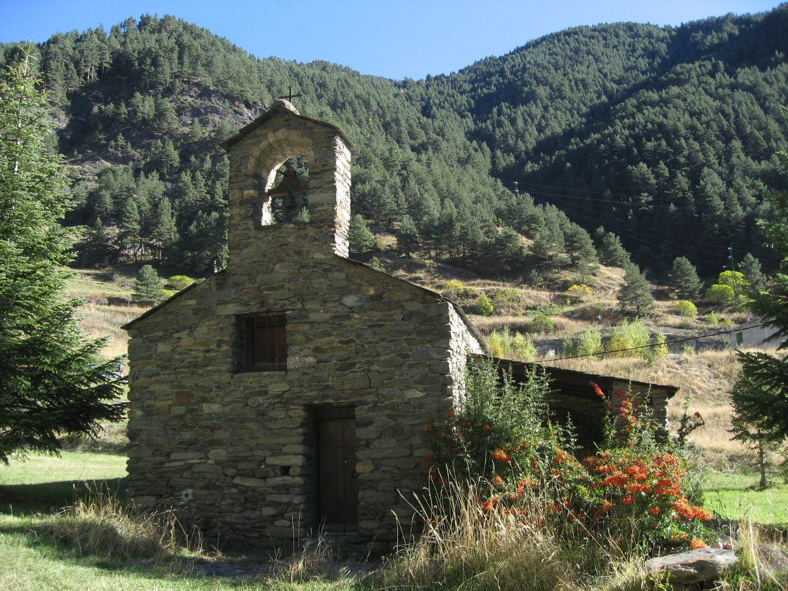 Sant Andreu del Prat del Campanar